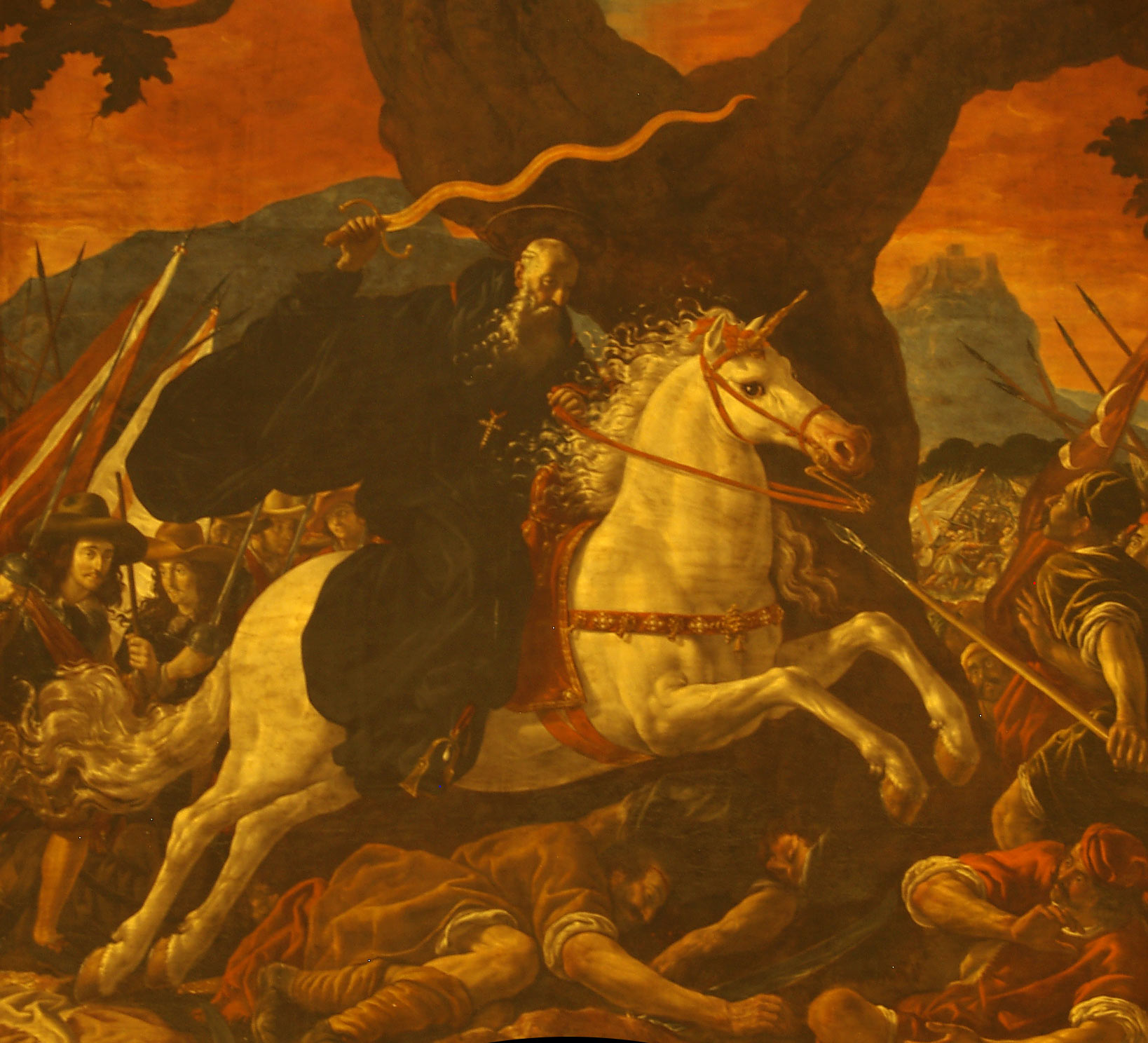 San Millán en la batalla de Hacinas.